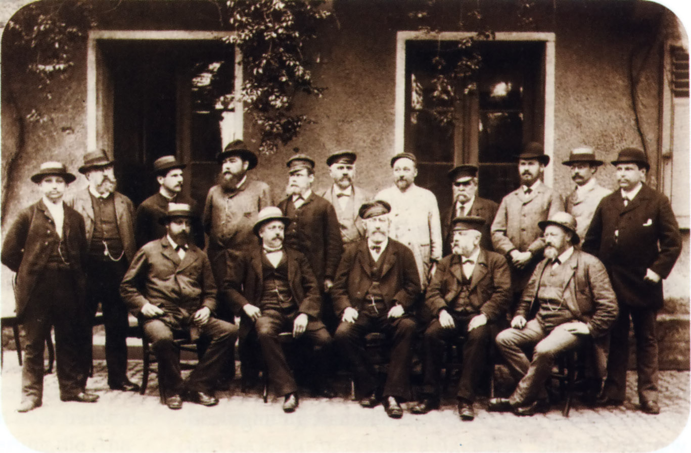 Die Betriebsleiter der Chemischen Fabrik Merck (heute Merck KGaA) im Jahr 1886. In der hinteren Reihe, 5. von links ist Carl Krauch Senior